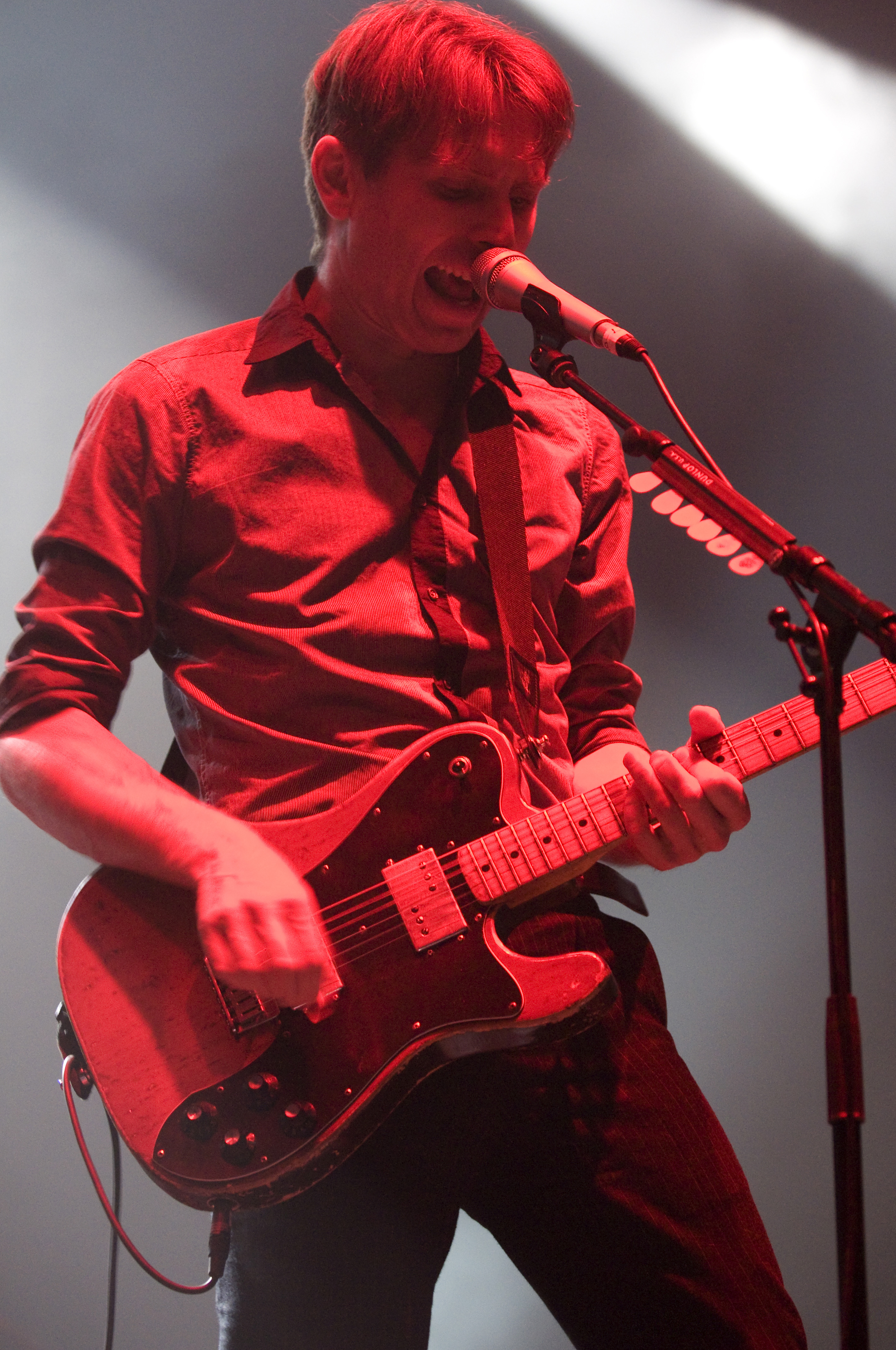 Franz Ferdinand (band)